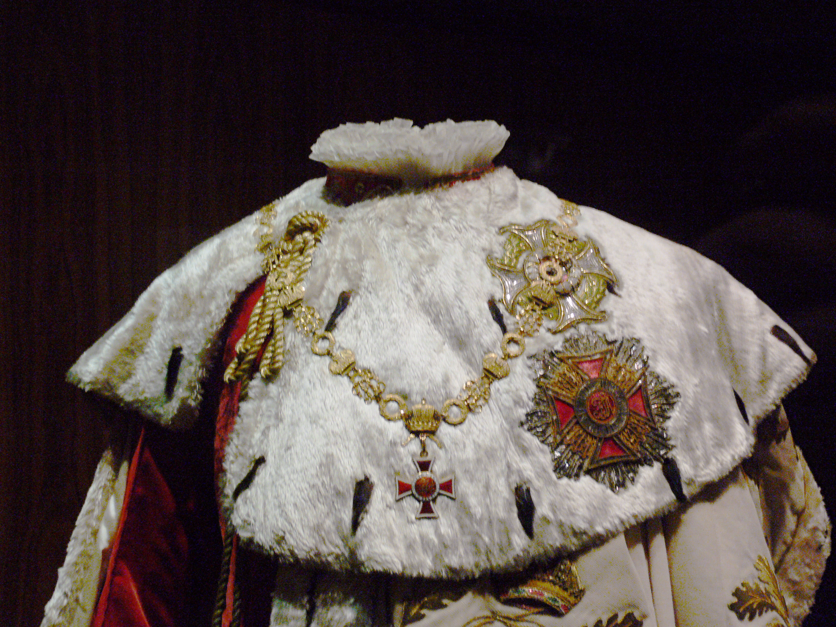 Detail vom Ornat des Leopoldsordens, 1808. Weltliche Schatzkammer, Wien.